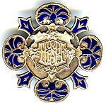 Écusson-logo de la Fédération gymnastique et sportive des patronages de France